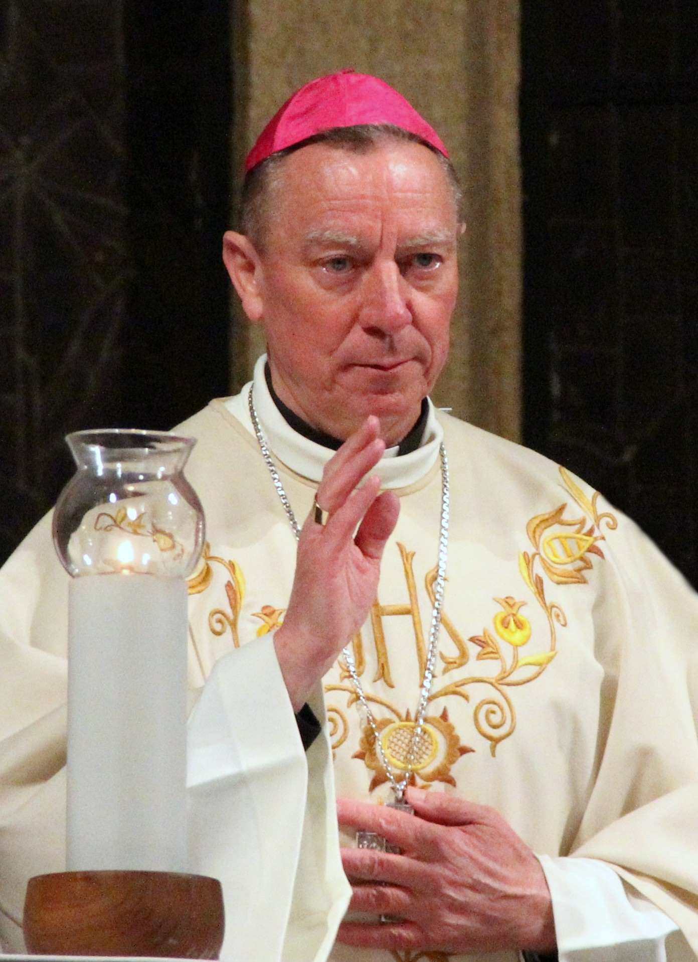 Beer Miklós püspök a városmajori Jézus Szíve templomban